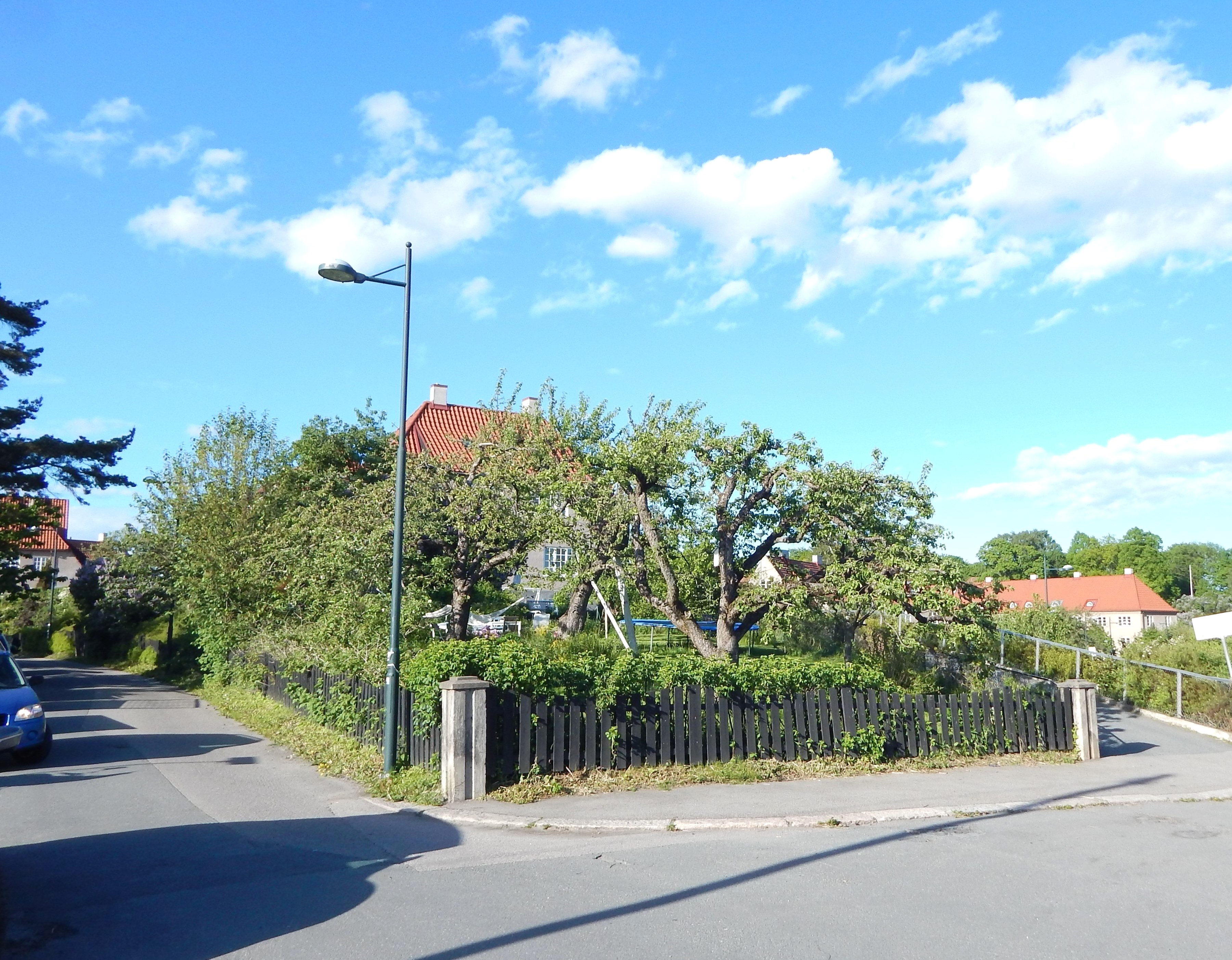 Per Gynts vei (t.v.) tar av fra Eventyrveien.